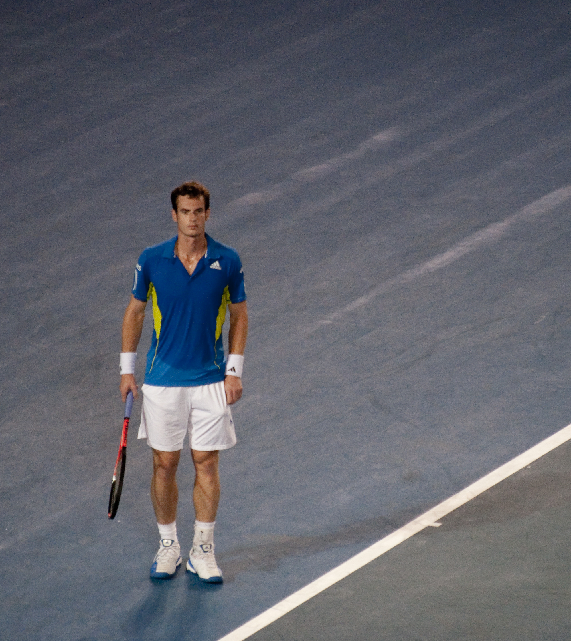 Australian Open 2010 Quarterfinals Nadal Vs Murray